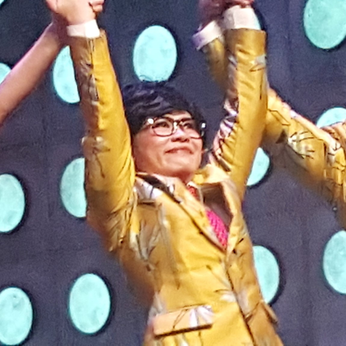 中文（香港）: 香港舞台劇女演員邵美君，風車草劇團W Theatre小人國6，在演出後演員謝幕時拍攝。